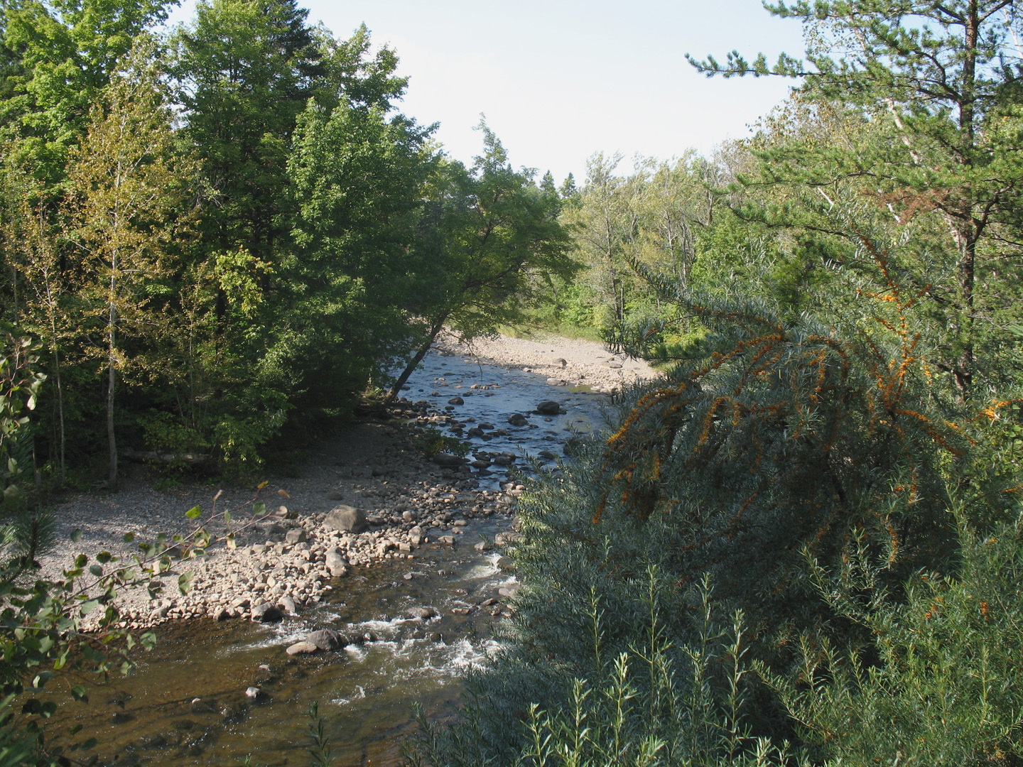 Parc Chauveau, sur le bord de la rivière Saint-Charles, ville de Québec, province de Québec, Canada